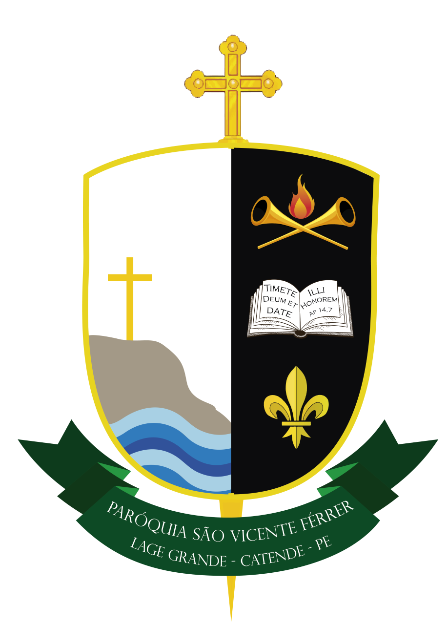 Brasão da paróquia de São Vicente Ferrer de Laje Grande - PE Elementos pensados pelo seminarista e administrador Lucas Lima. Produzido pelo seminarista e publicitário Cícero Adson.